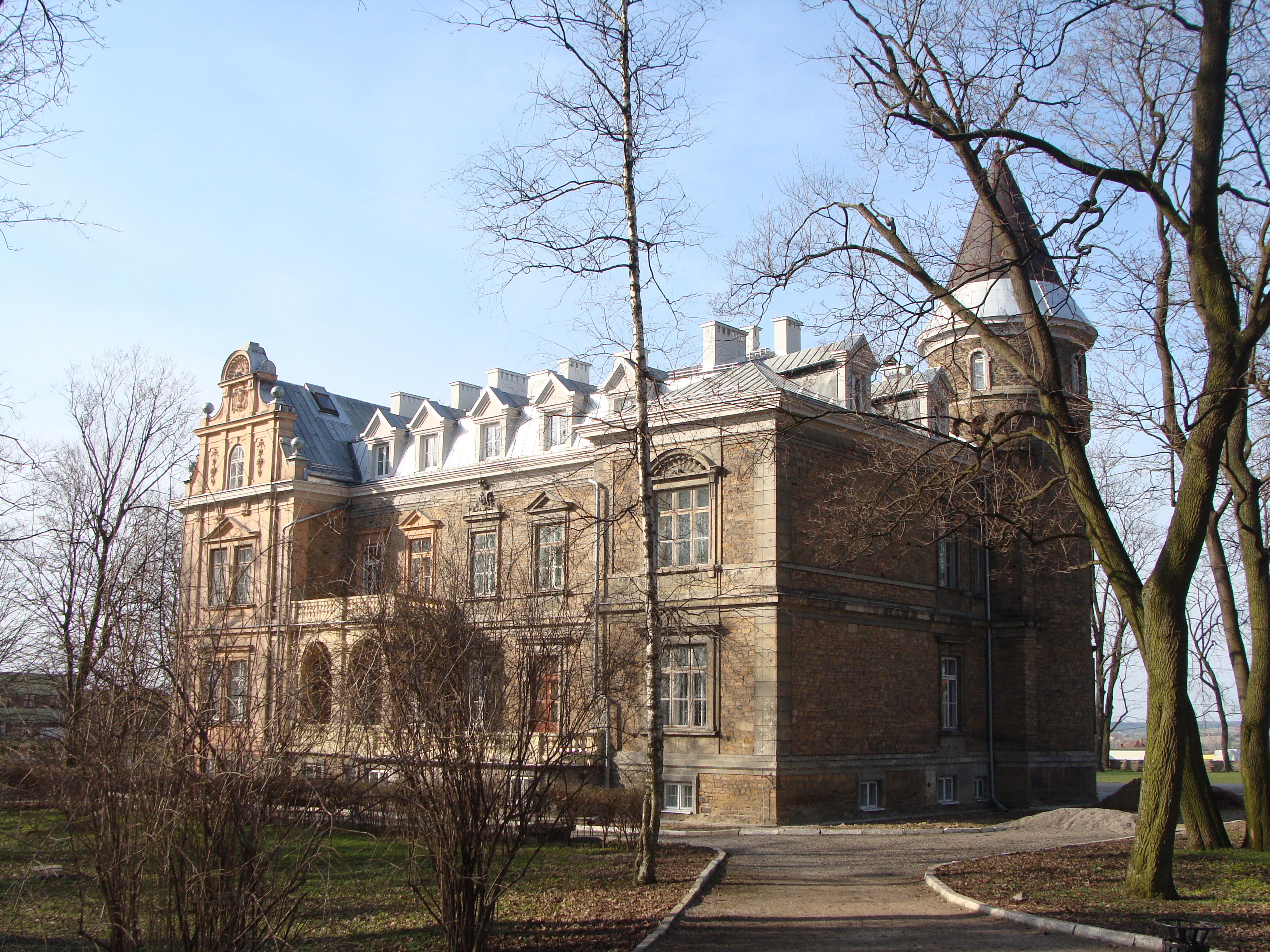 Rezydencja Dobieckich w Łopusznie